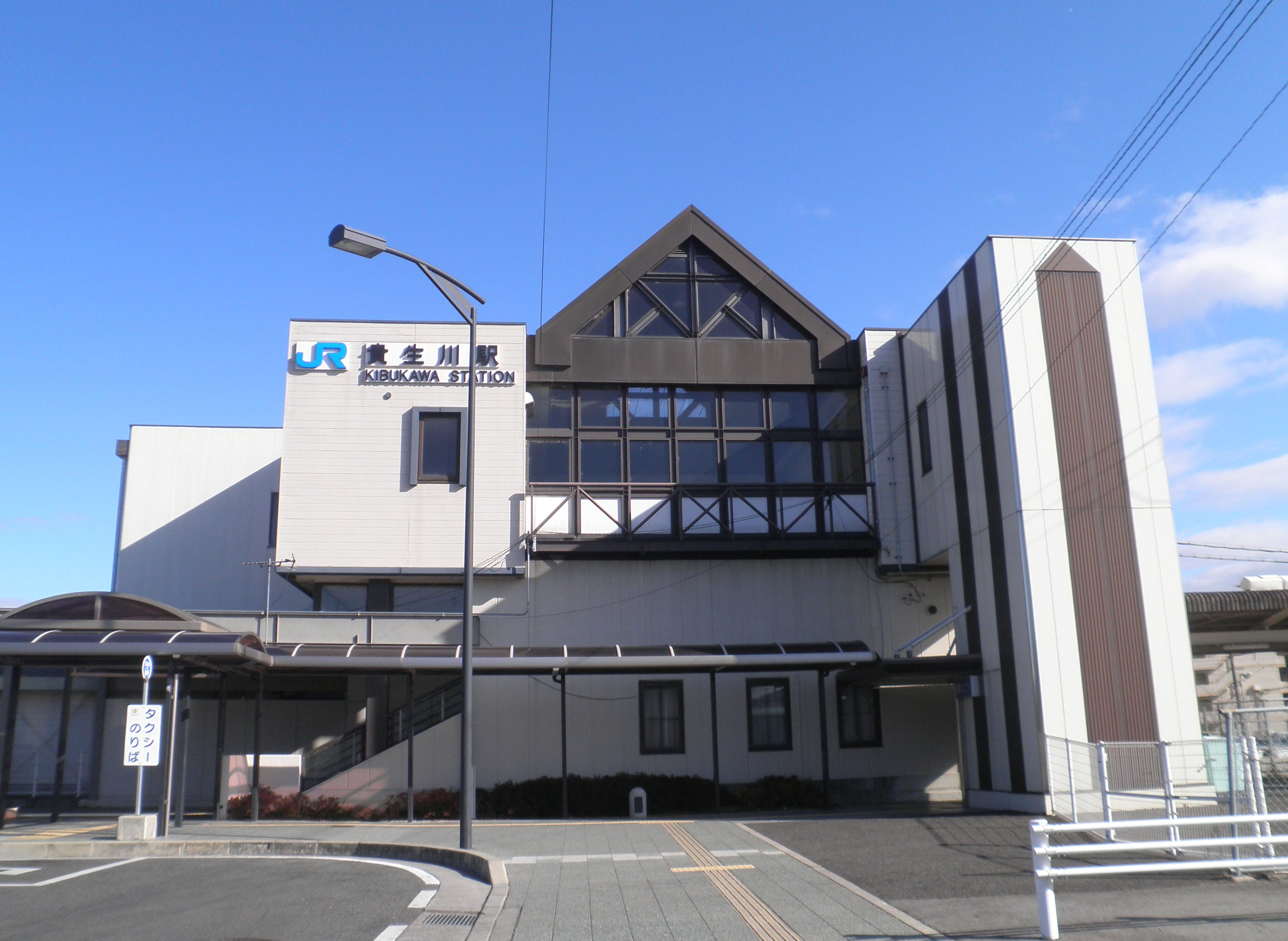 滋賀県甲賀市にある貴生川駅の南口